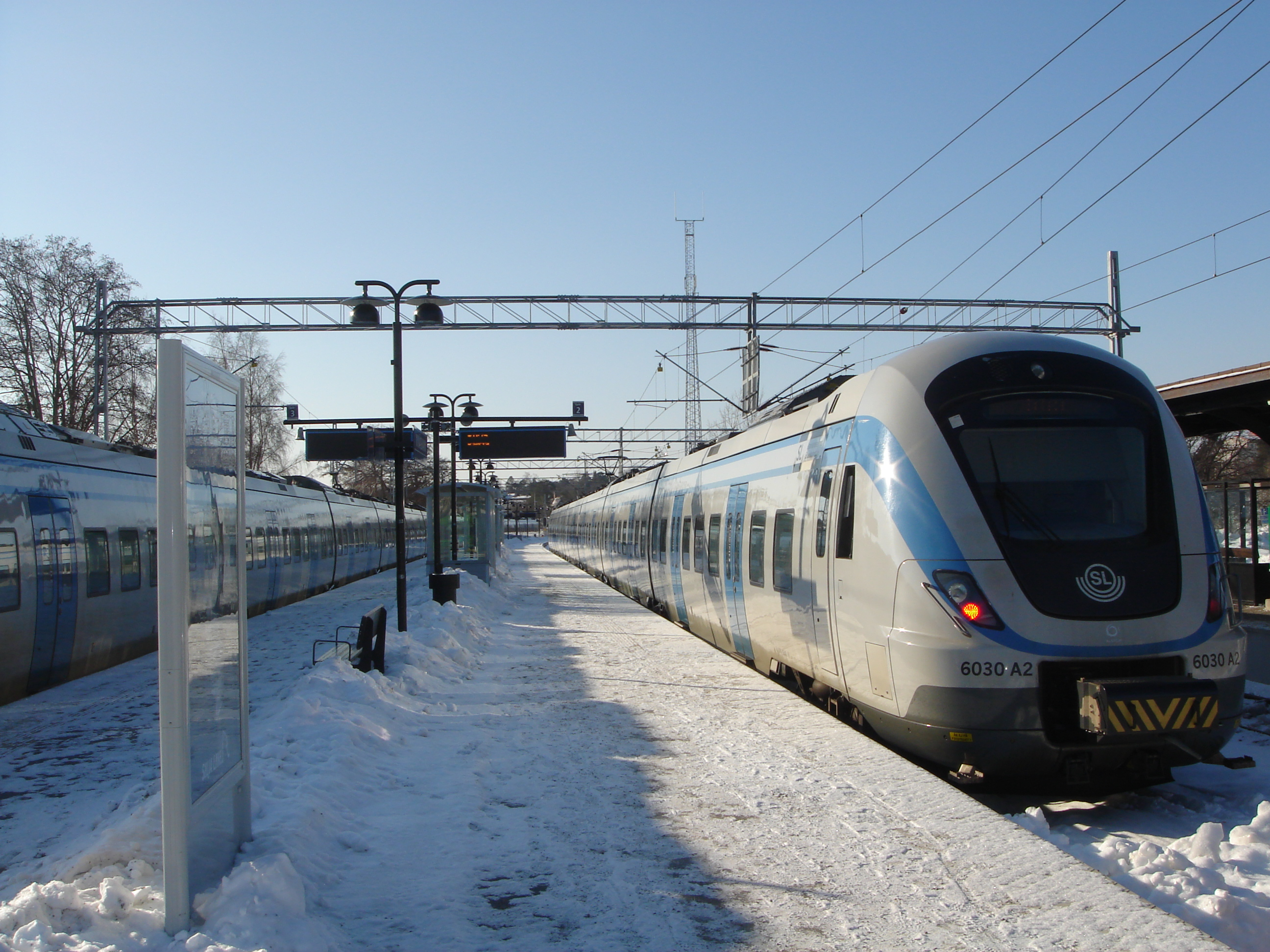 Nynäshamn station